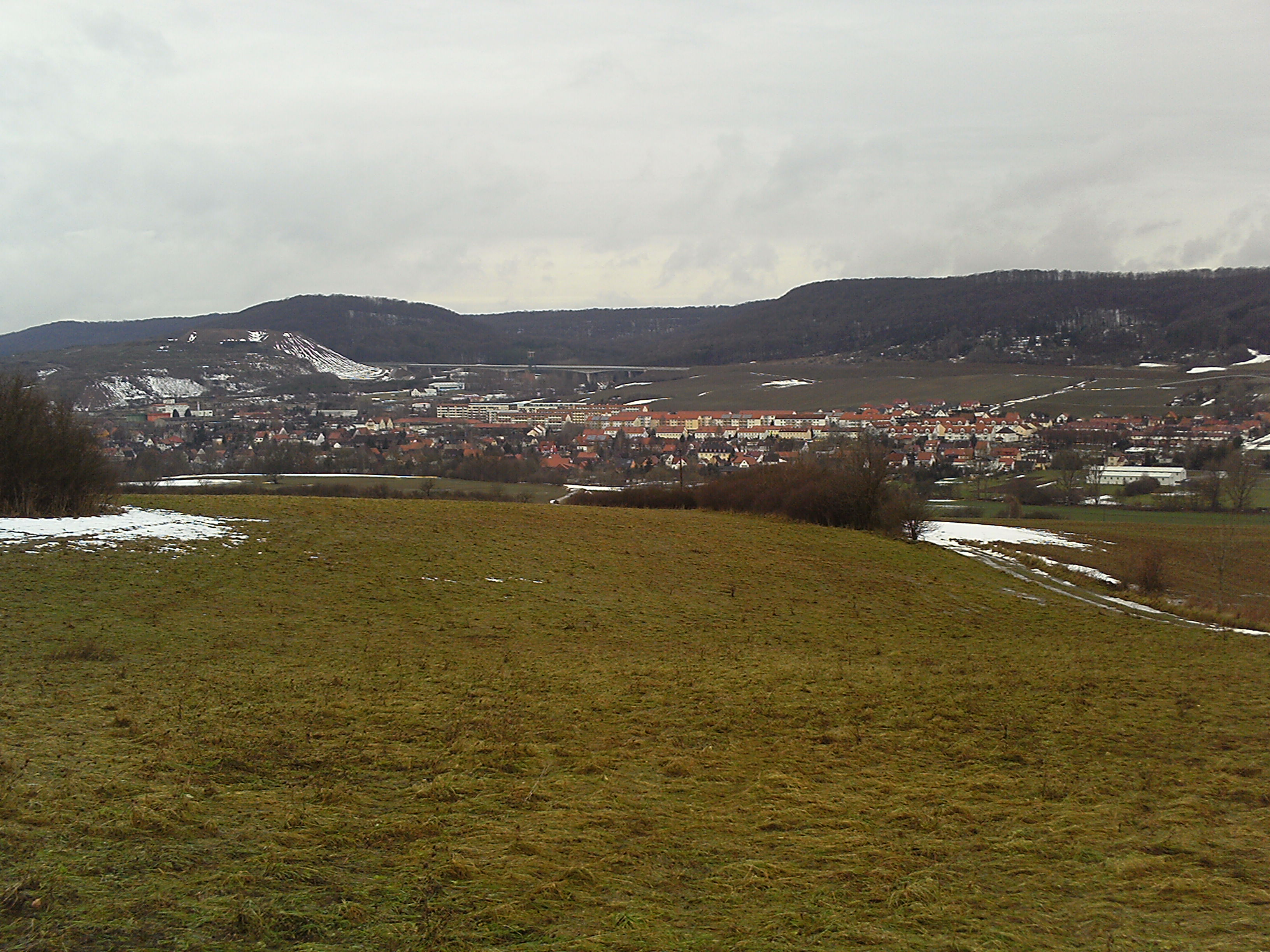 Blick auf Sollstedt (im Hintergrund die Bleicheröder Berge mit dem Teichkopf (re) und Egelskopf (li))